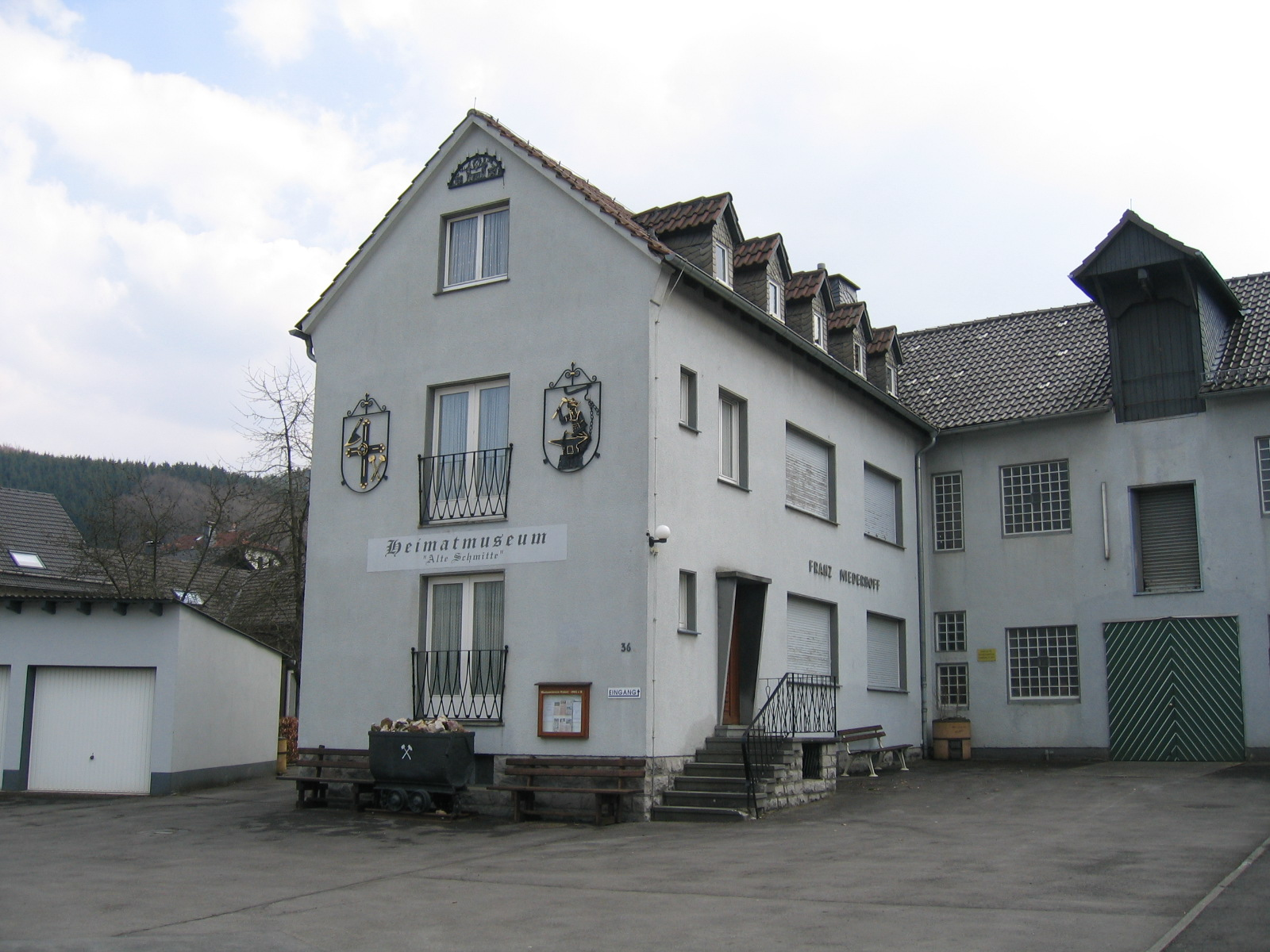 Heimat- und Jagd-Museum "Alte Schmitte" in Sundern-Endorf.